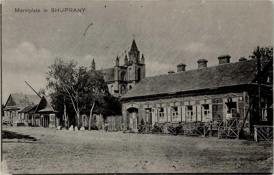 Беларуская (тарашкевіца): Жупраны (Župrany), пляц Рынак (plac Rynak)